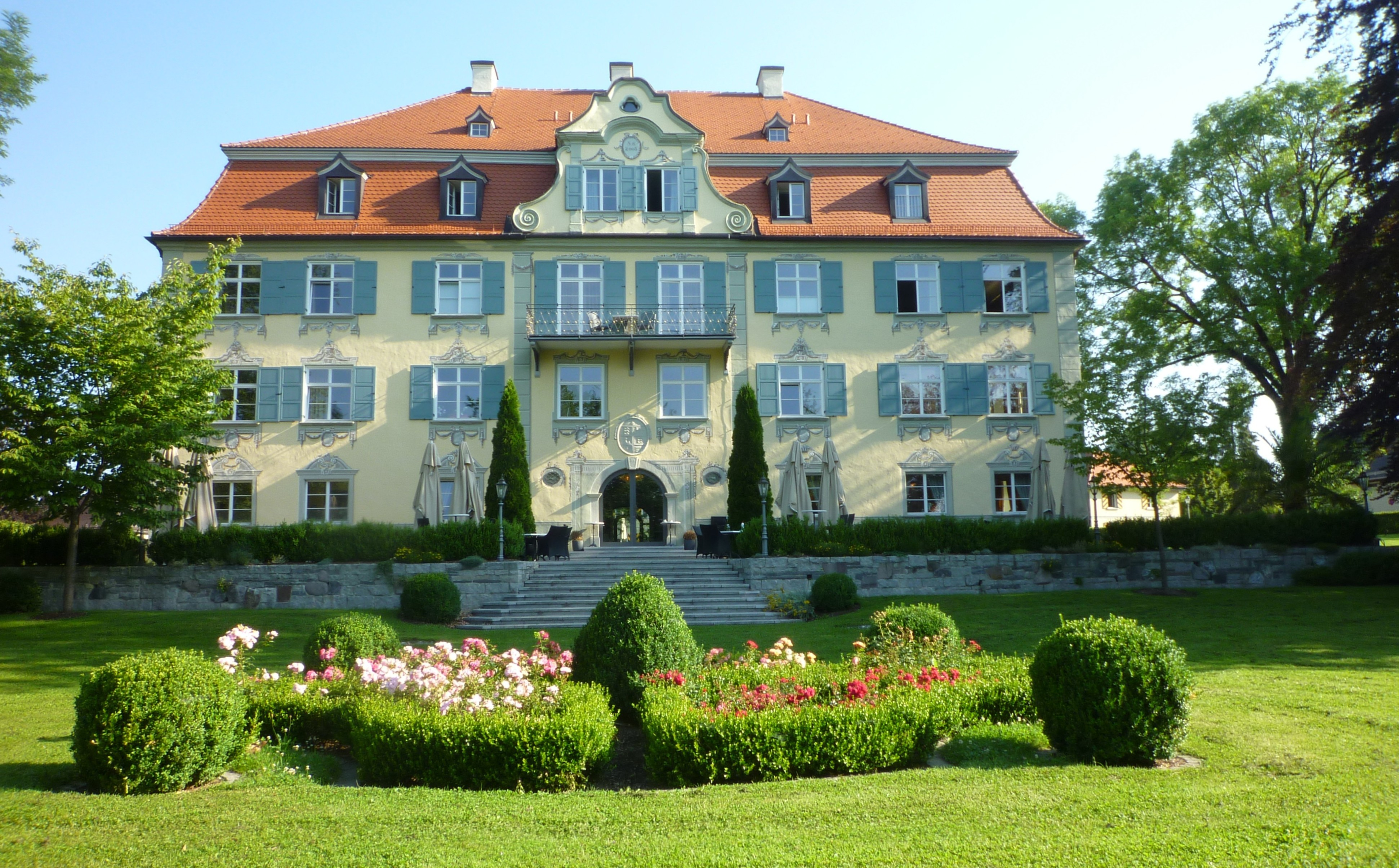 Isny - Neutrauchburg,Schloss mit Park